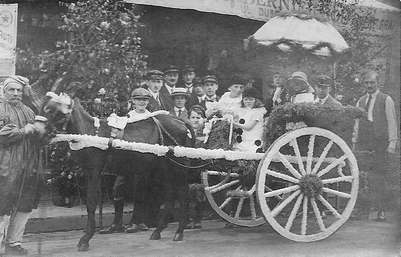 La Mi-Carême 1925 à Tinchebray.